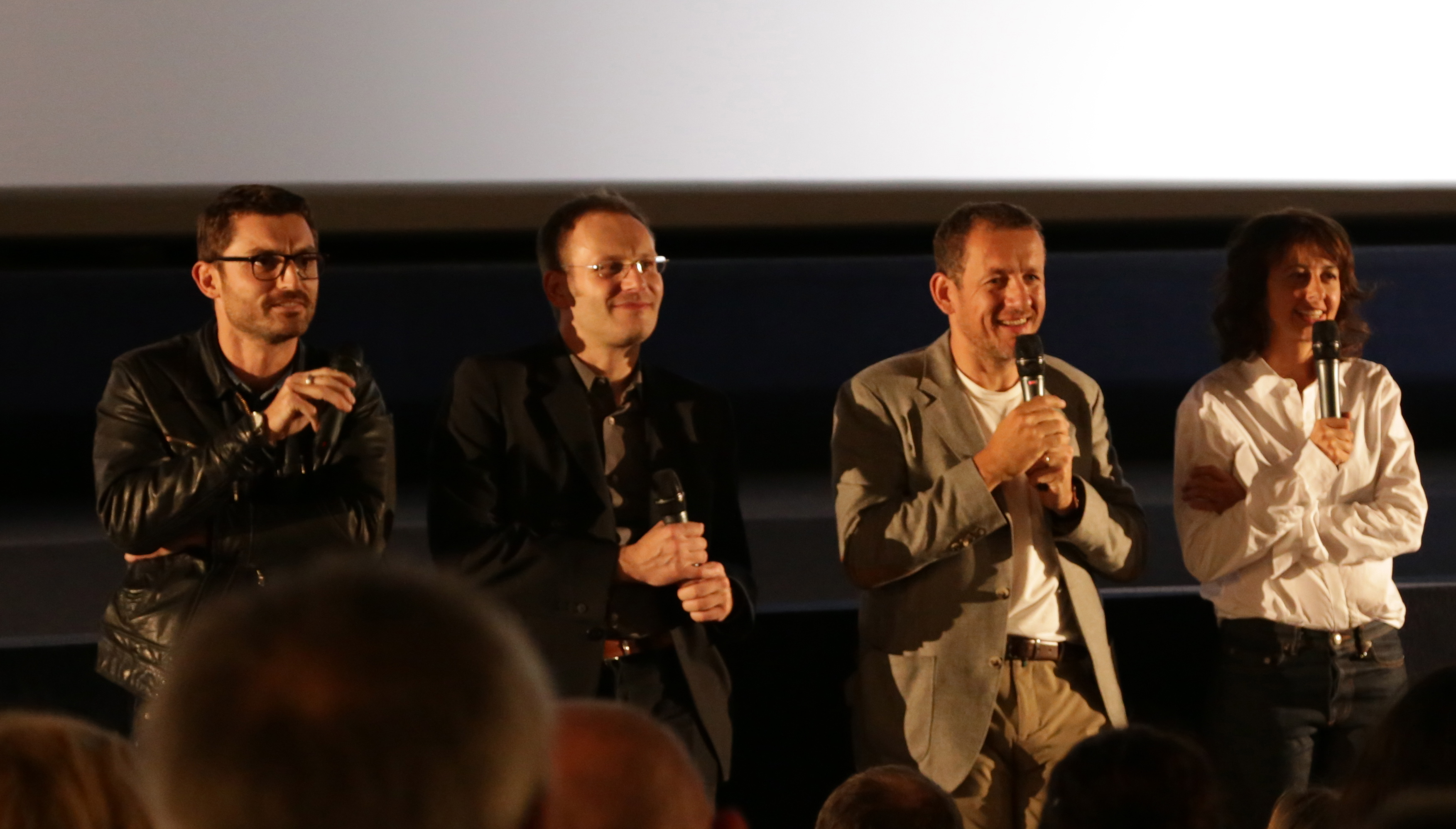 Lors de la présentation du film Eyjafjallajökull en avant-première le 16/09/2013 à Lyon avec sur la gauche Alexandre Coffre, le réalisateur